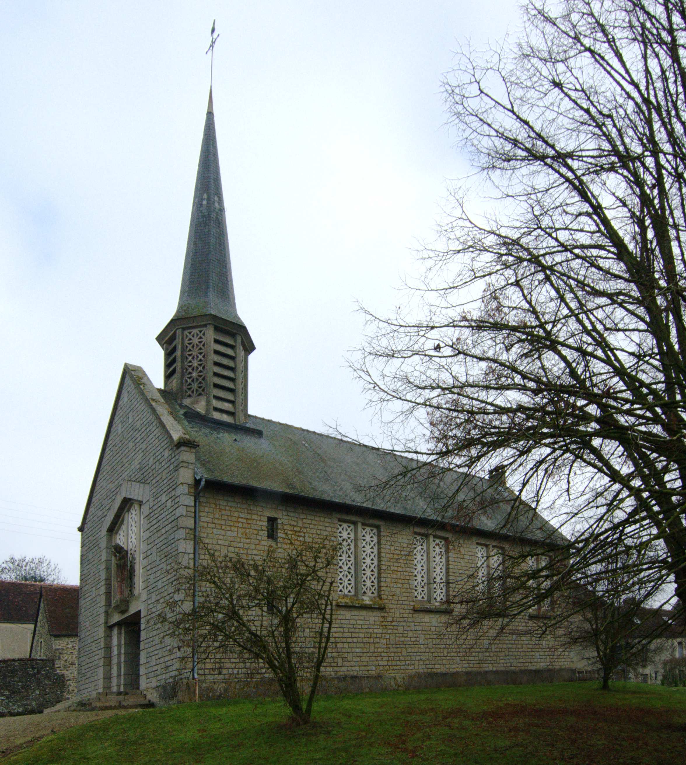 L'église de Rônai, Orne.